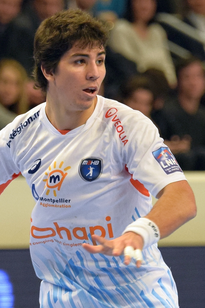 Diego Simonet, demi-centre du club Montpellier Agglomération Handball. Le 03 décembre 2014 lors du match face au PSG Handball.